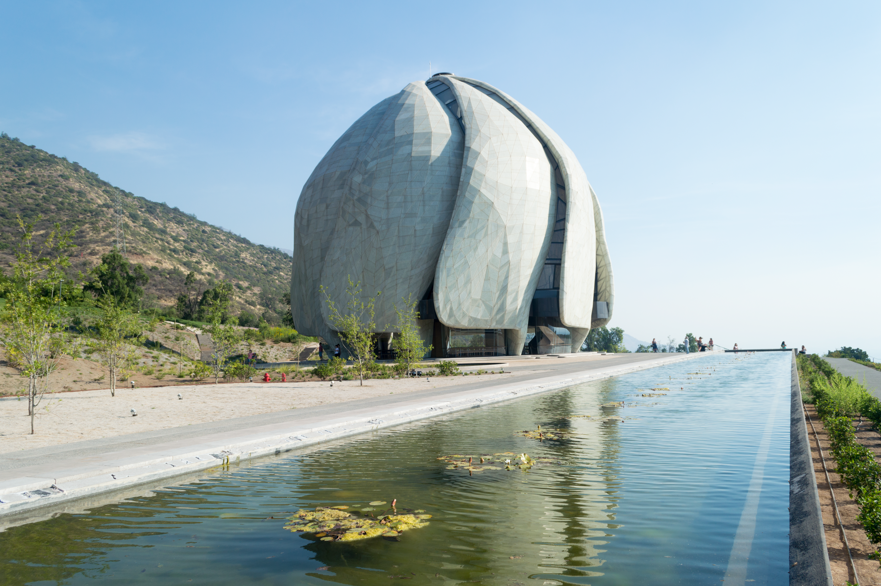 Templo Bahá'í de Sudamérica